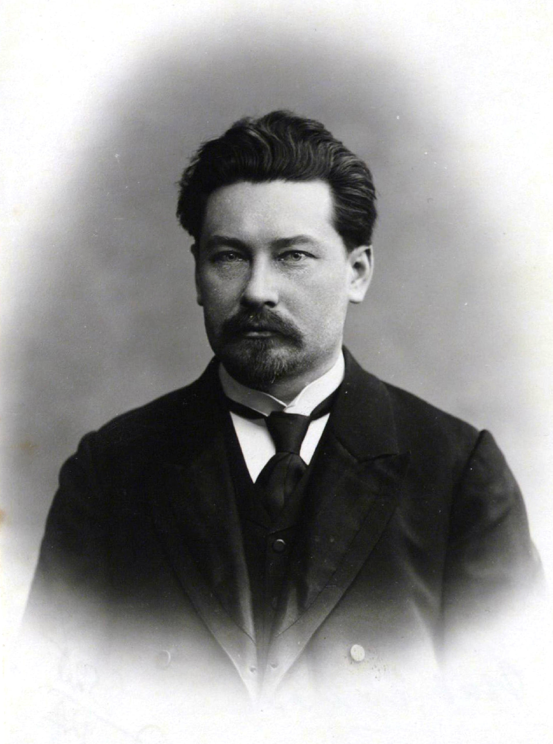 Юрашевскис, Петерис